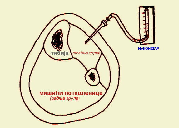 Мерење интракомпартментског притиска у предњој мишићној ложи потколенице, др М.Димић, Ниш, 2009. Licensing